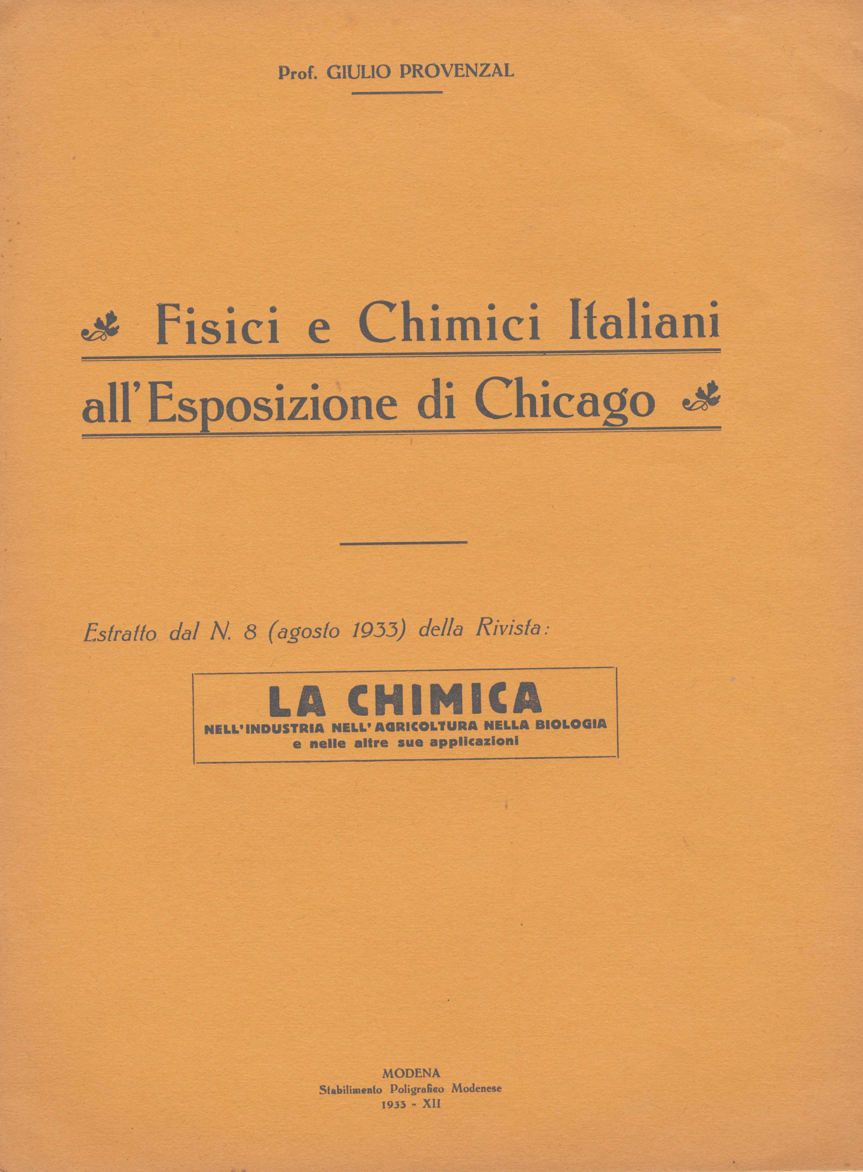 Pubblicazione di Giulio Provenzal.